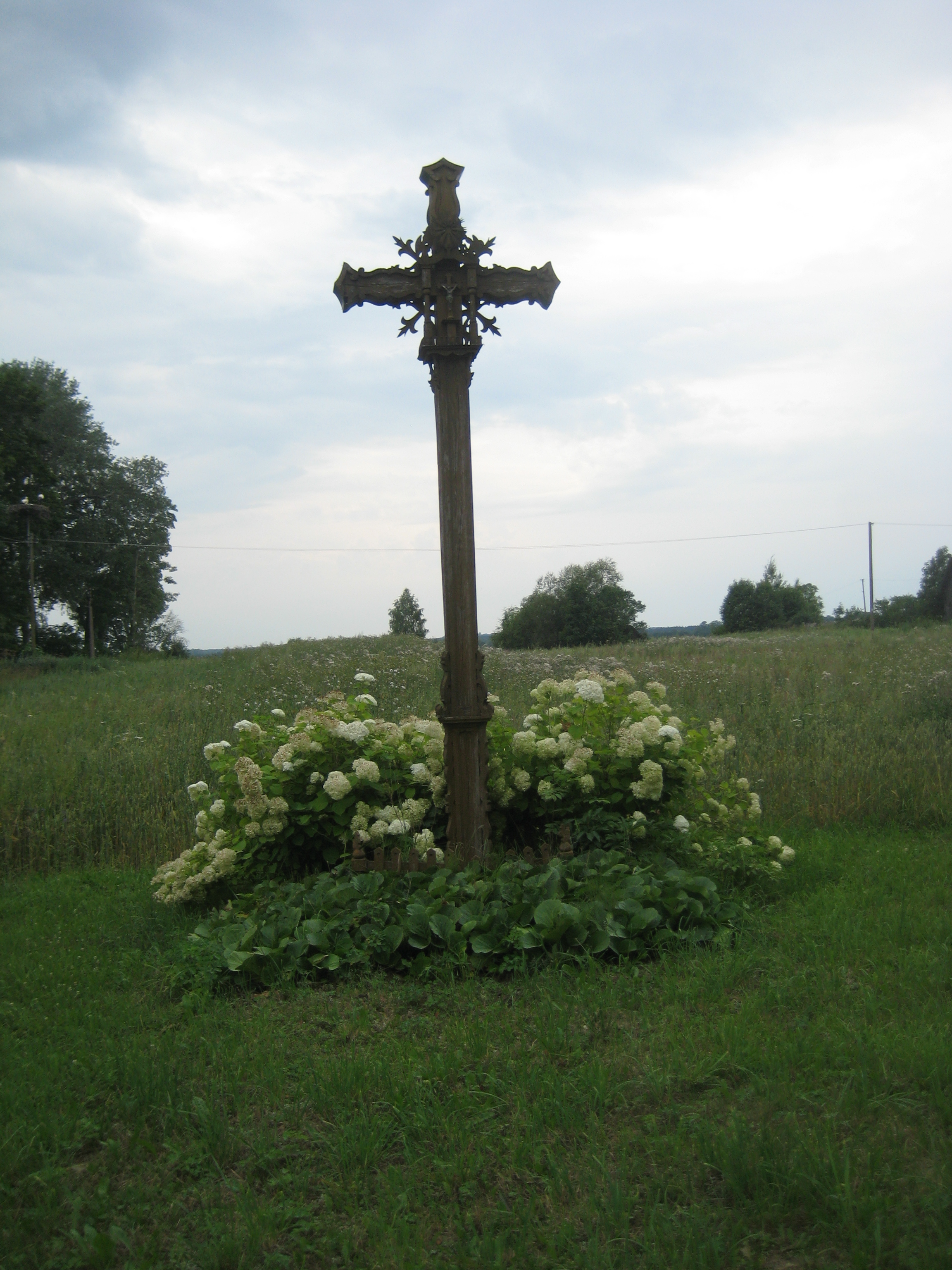 Kriaunų sen., Lithuania